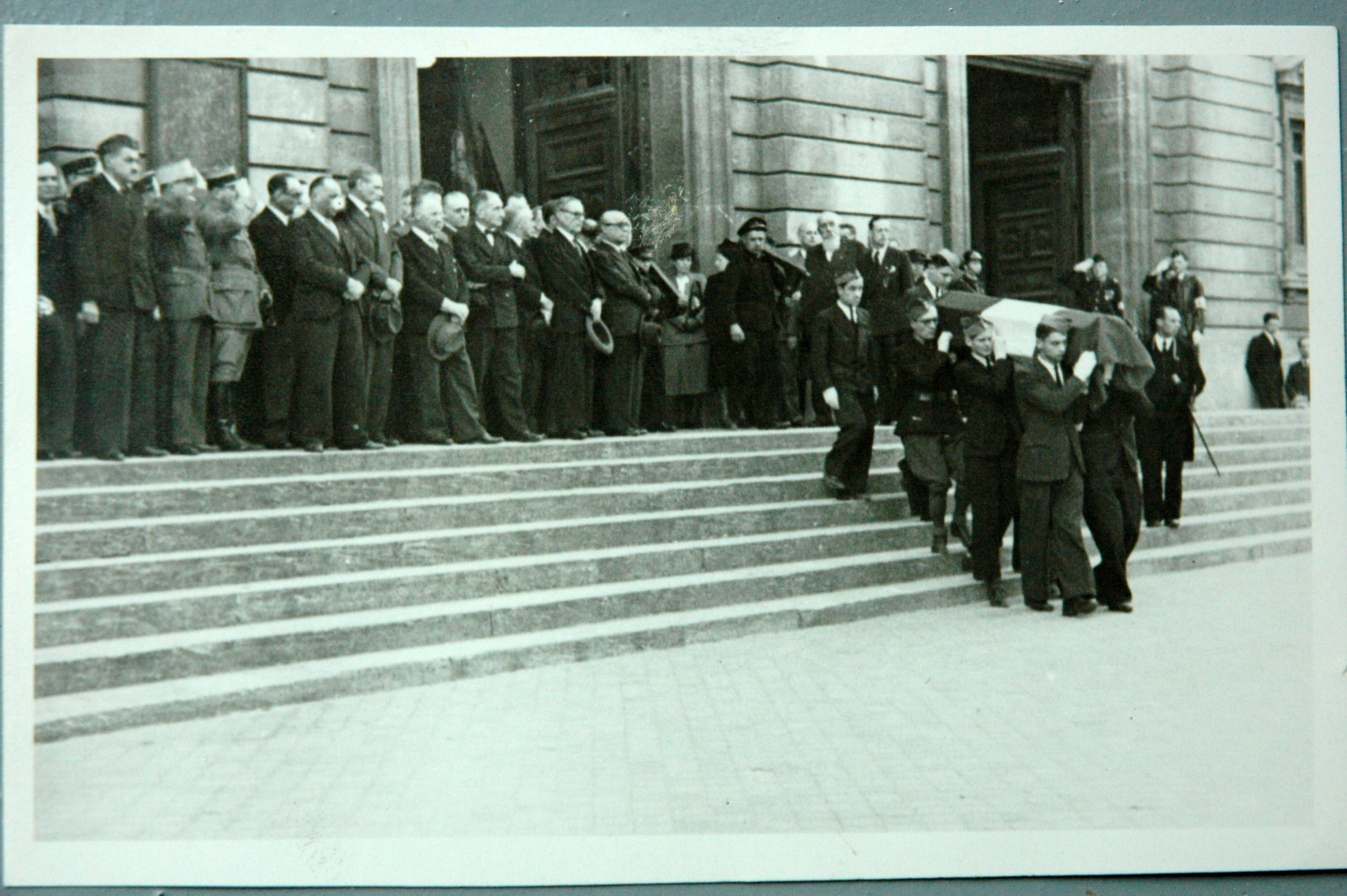 Bordeaux 21-04-1945 Faculté de Medecine